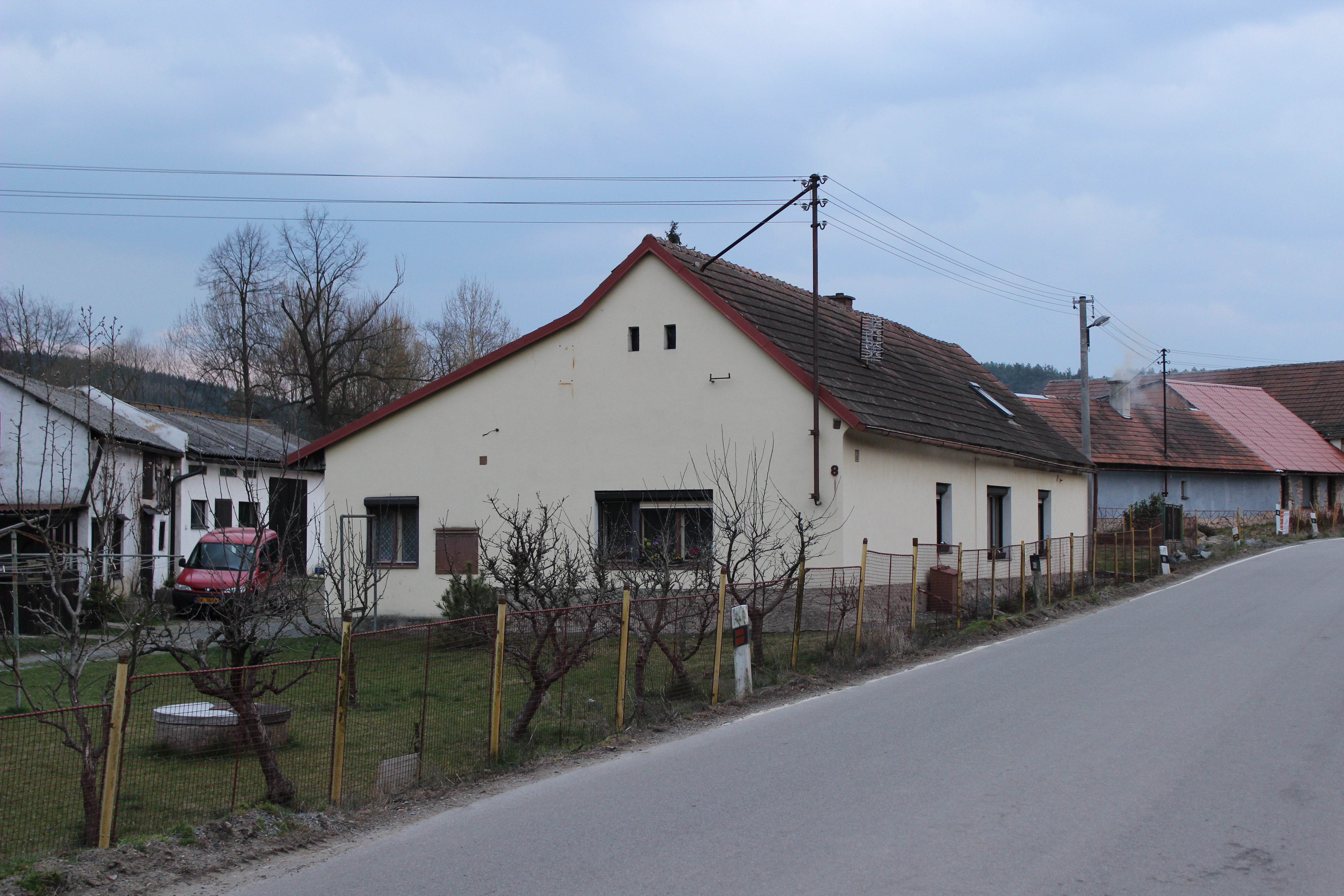 Dům číslo popisné 8 ve Spolí, části Neveklova. This photograph was taken with a Canon EOS 600D.